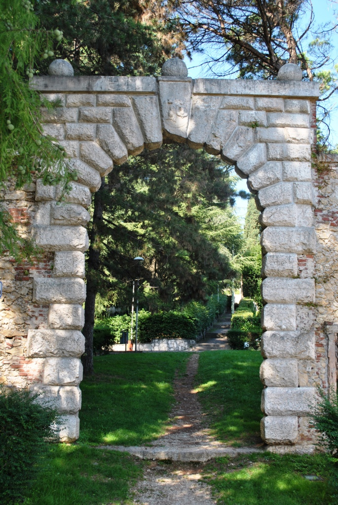 Oratorio di Santa Maria in Valle (Madonna della Salute) This is a photo of a monument which is part of cultural heritage of Italy.